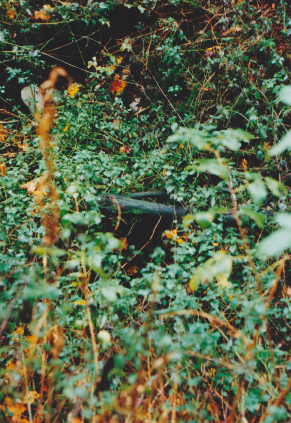 Verbrochener Stollen der Mangan-Grube Elisabeth I bei Rösenbeck (Scan einer Analogfotografie)